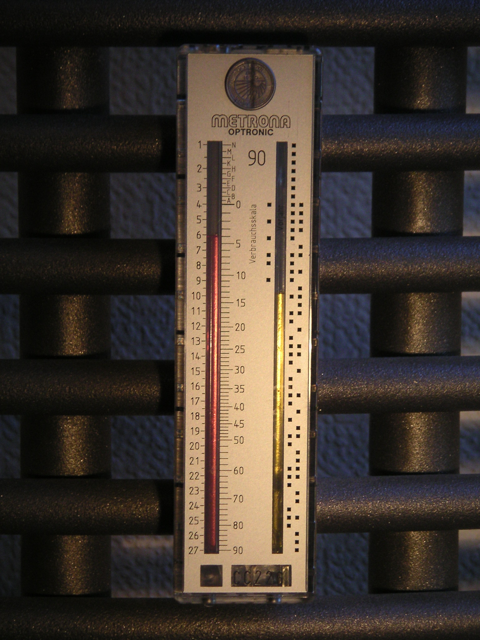 Heizkostenverteiler METRONA Optronic